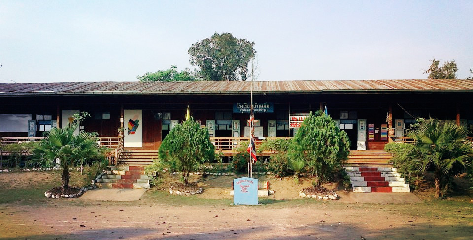 โรงเรียนบ้านเค็ม (รัฐประสาทราษฎร์บำรุง)